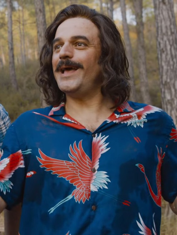 Sen Sağ Ben Selamet - Teaser'ından Ufuk Özkan